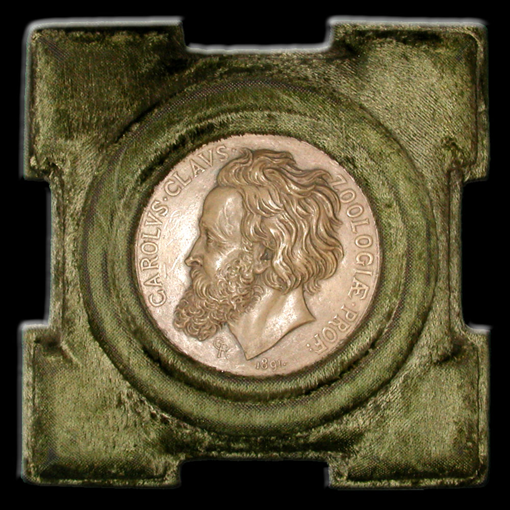 Carl Claus (1835-1899); Prof. für Zoologie und vergleichende Anatomie